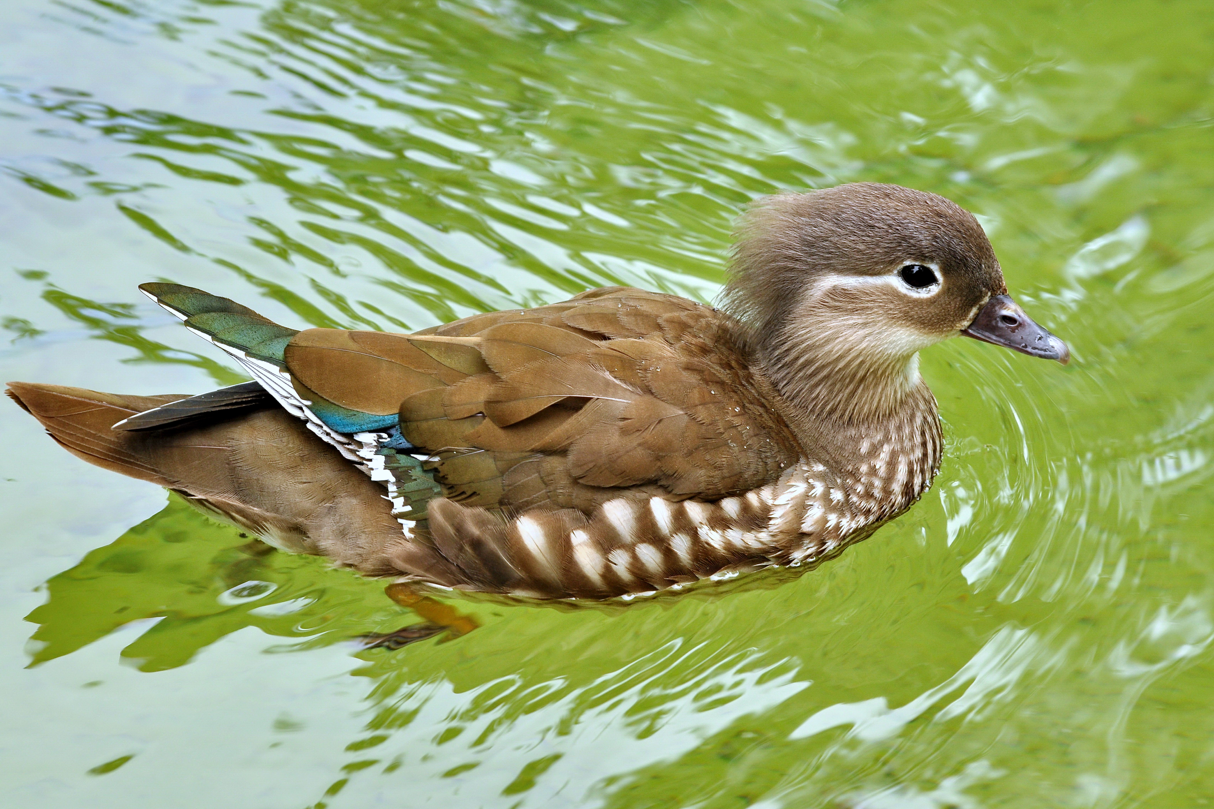 Aix galericulata, Nymphenteich, Zürichhorn in Zürich-Seefeld (Switzerland)